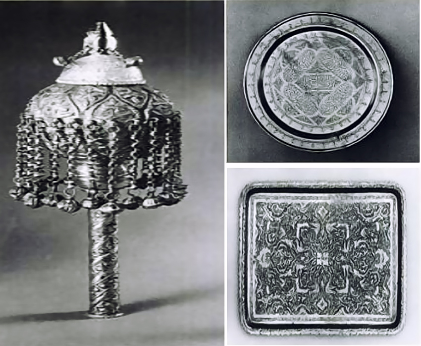 تاج تورات مربوط به یهودیان بوکان، نگهداری در موزه اورشلیم (نسخه سیاه وسفید(Rimonim)